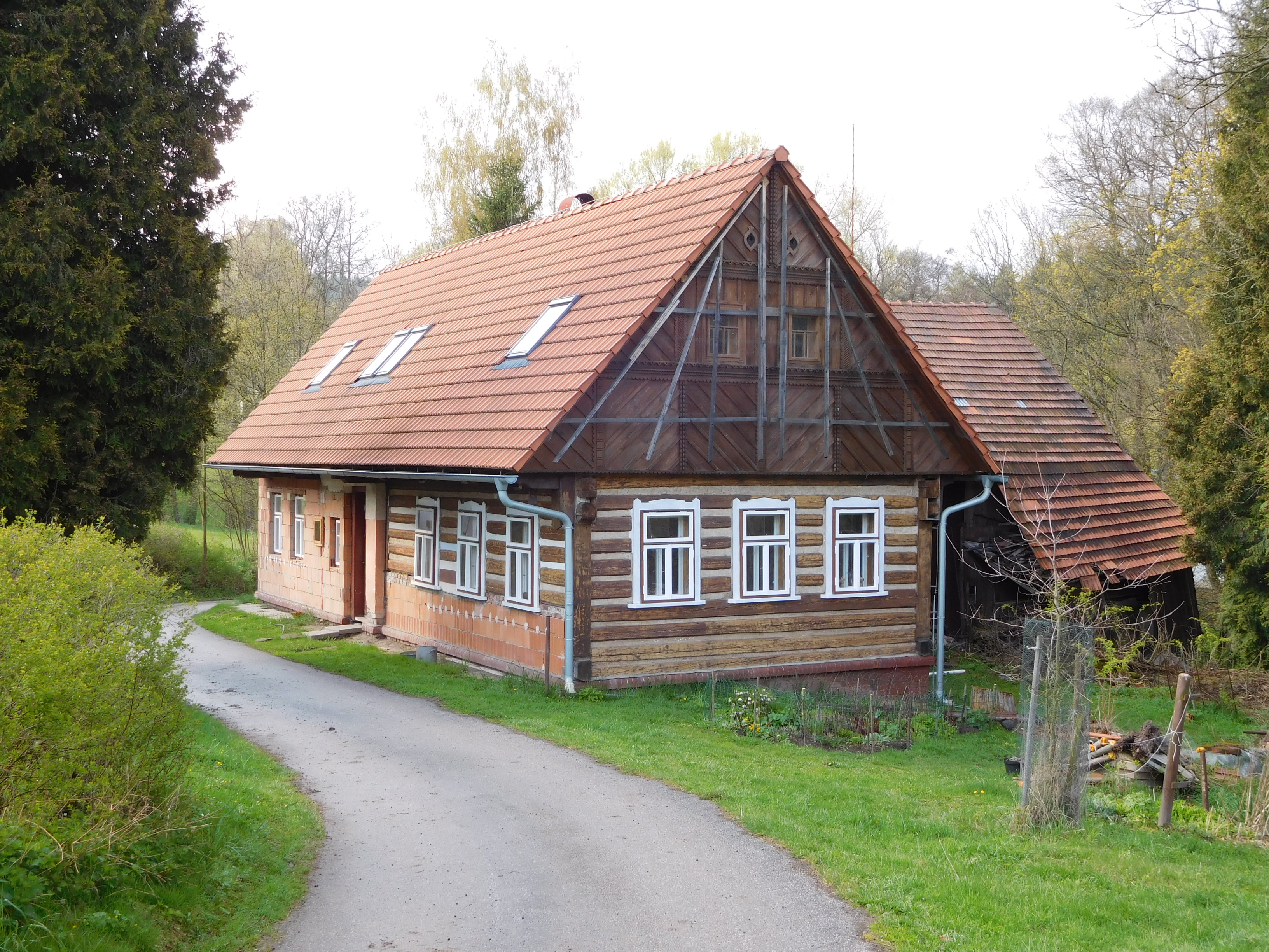 Valdice - dům č.p. 252